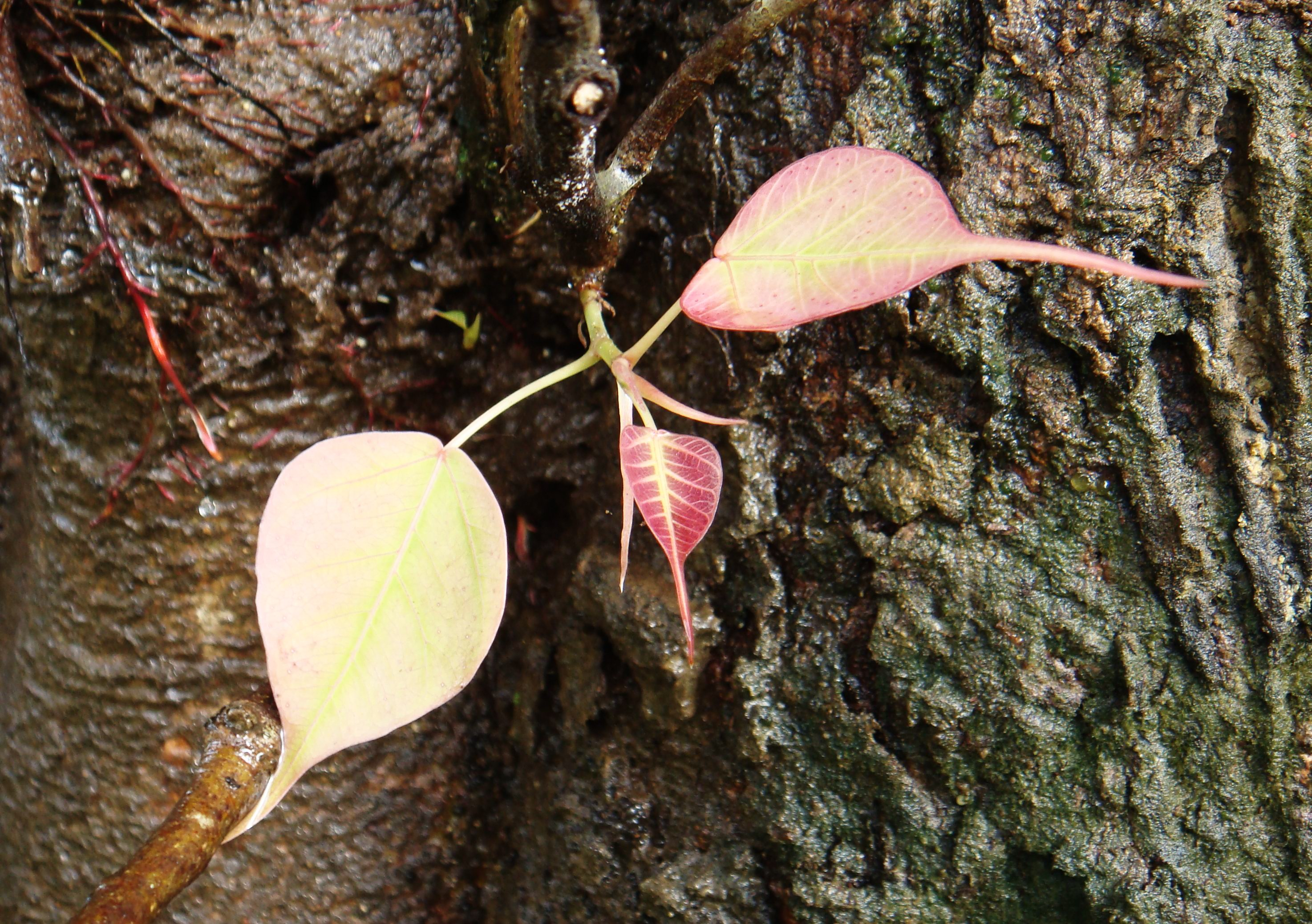 ആലില-തളിർ